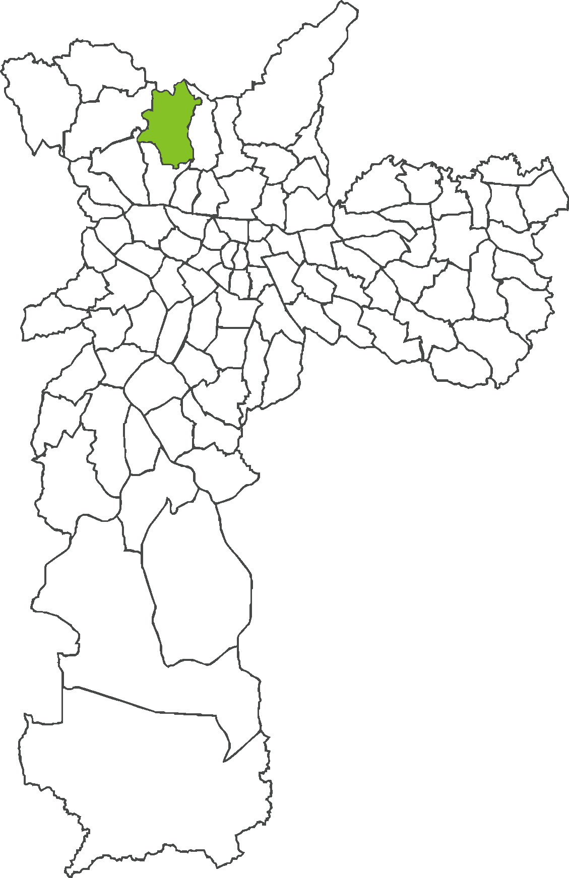 Localização do distrito da Brasilândia no município de São Paulo.